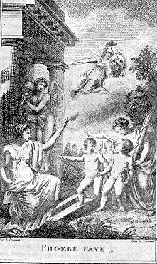 Ф.Ф.Р. — Репнин (Фомин) Флор Филиппович (1788–1855) – действительный член по части художеств Вольного общества любителей словесности, наук и художеств (ВОЛСНХ, 1801-1826), живописец, учитель рисовального искусства при Харьковском университете. Виньетка, рисованная Ф. Ф. Репниным и гравированная Н. И. Уткиным, приложена была к альманаху ВОЛСНХ «Свиток муз» (СПб., 1802)/